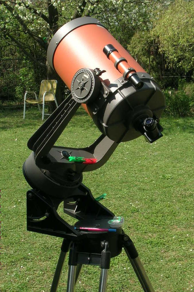 Celestron-Teleskop C8, auf Venus gerichtet